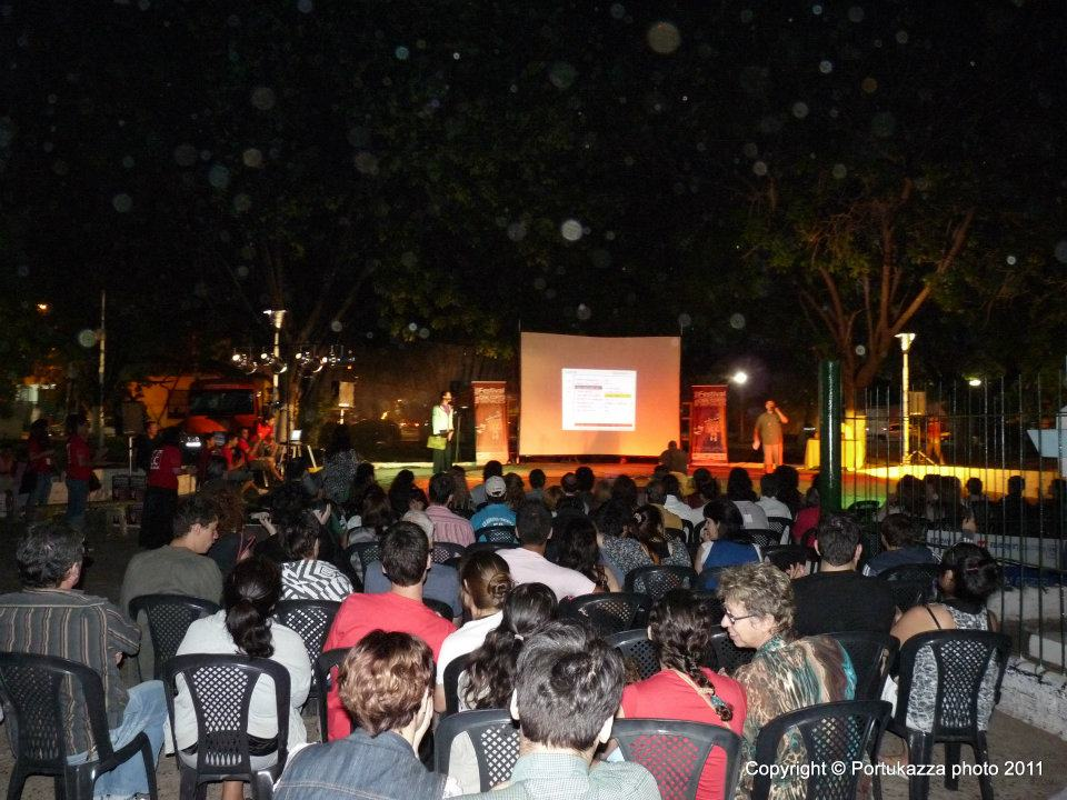 Proyección de la octava edición del Festival de Cine de Tapiales